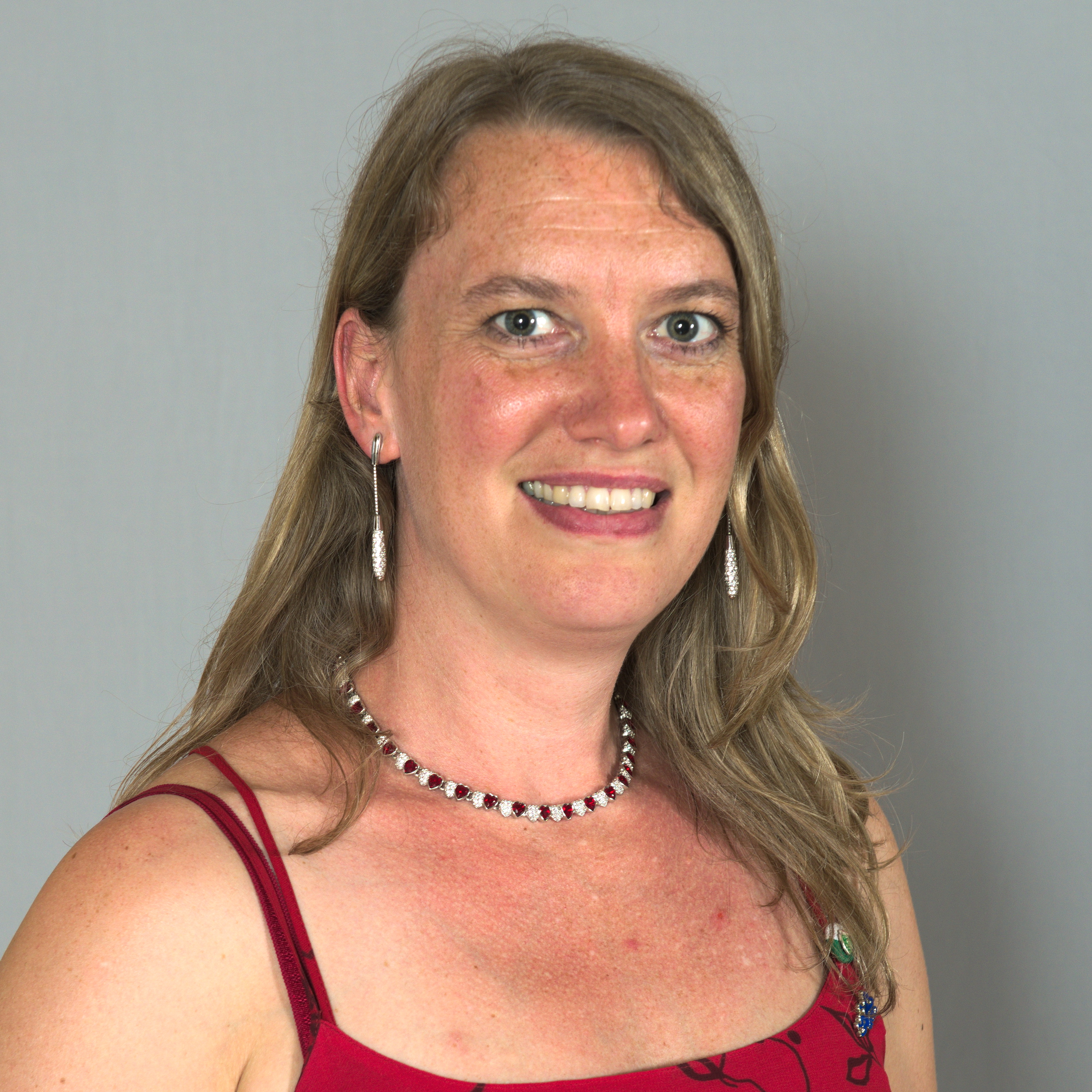 Hedwig Staller, österreichische Politikerin (FPÖ)